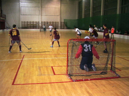 Floorball